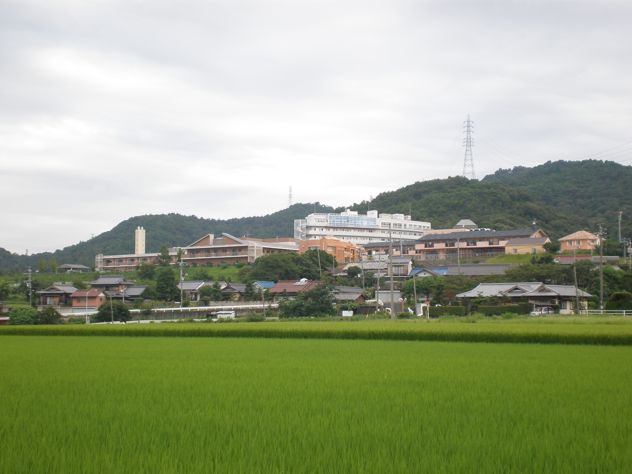 愛知県小牧市にある福祉の郷（ふくしのさと、写真中央の丘陵地の上）